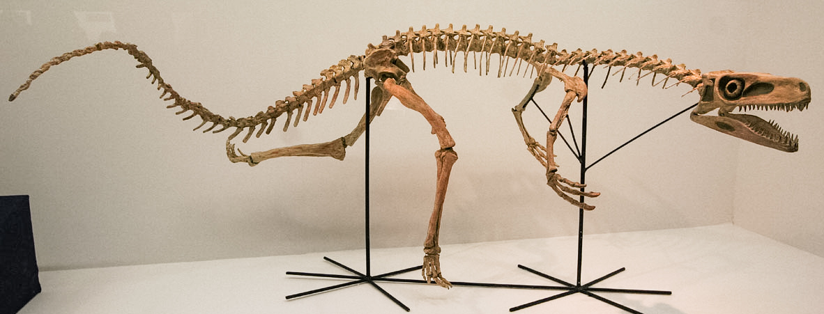 Staurikosaurus - 01